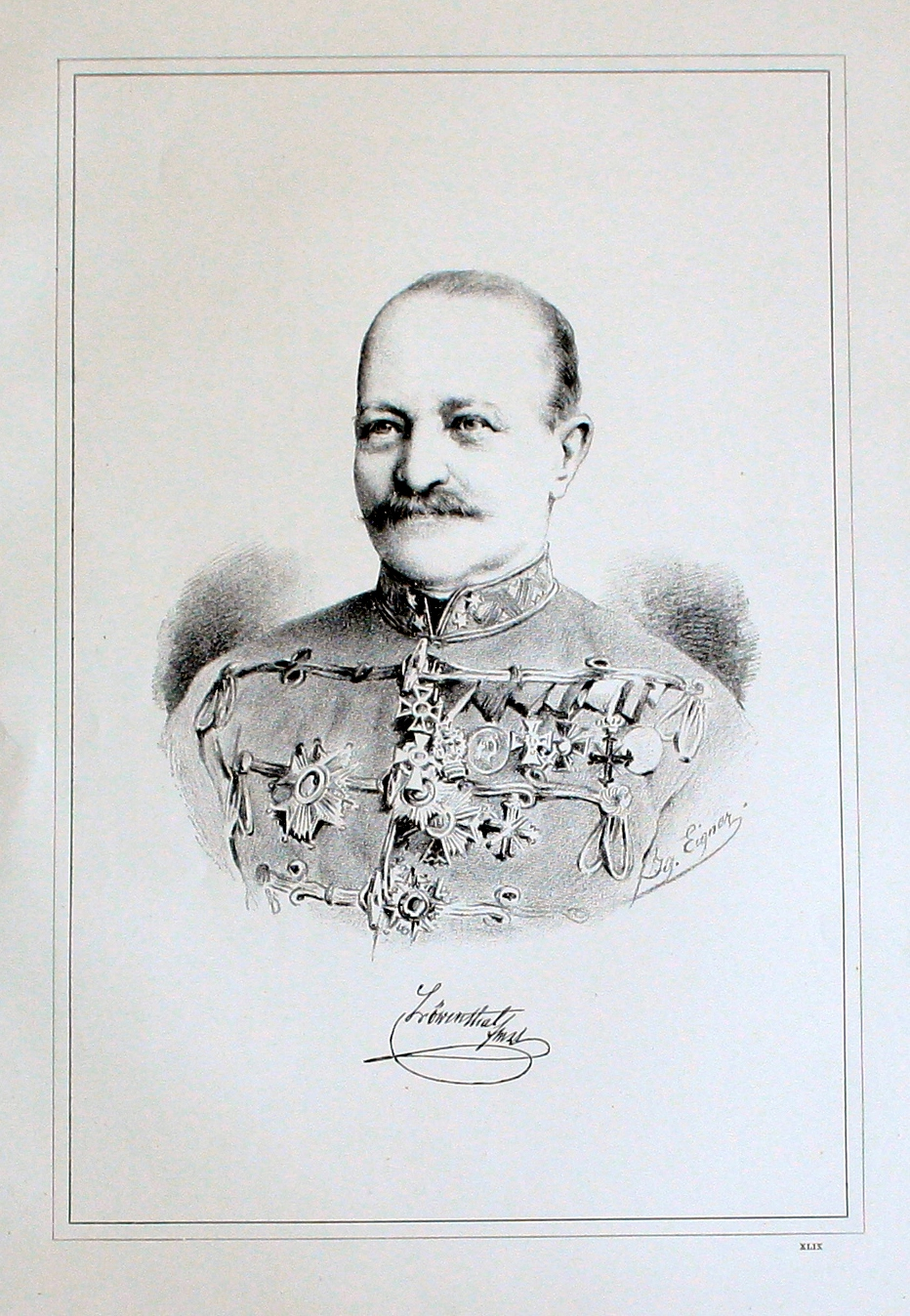 Johann Freiherr von Löwenthal (1803 - 1891), österreichischer Feldherr